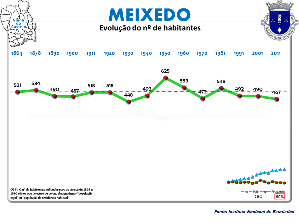 Censos 1864/2011